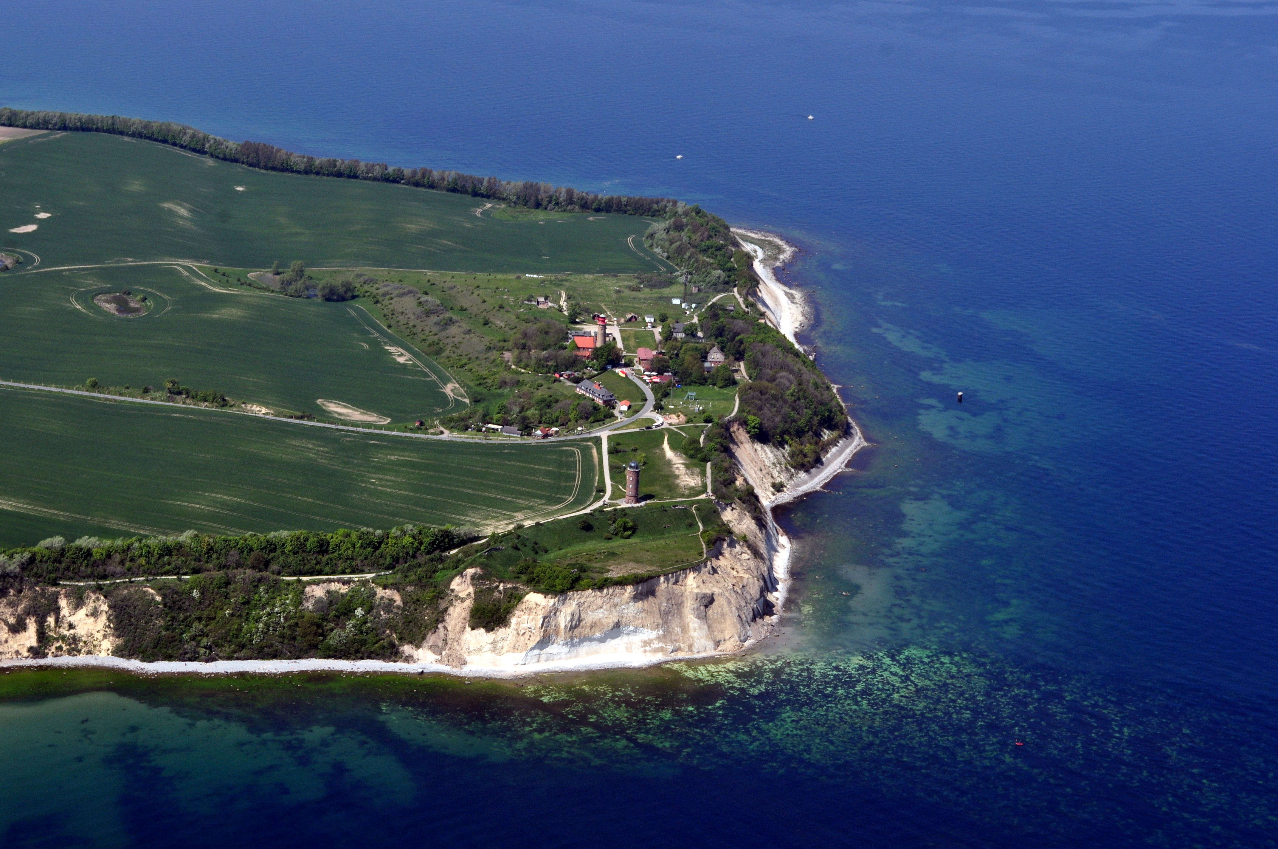 Die Bilder wurden von mir während eines einstündigen Rundflugs ab Flugplatz Güttin am 21. Mai 2011 aufgenommen. Die Bildbeschreibung steht im Dateinamen. Aufgenommen mit einer Nikon D5000 durch das Seitenfenster des Flugzeugs.